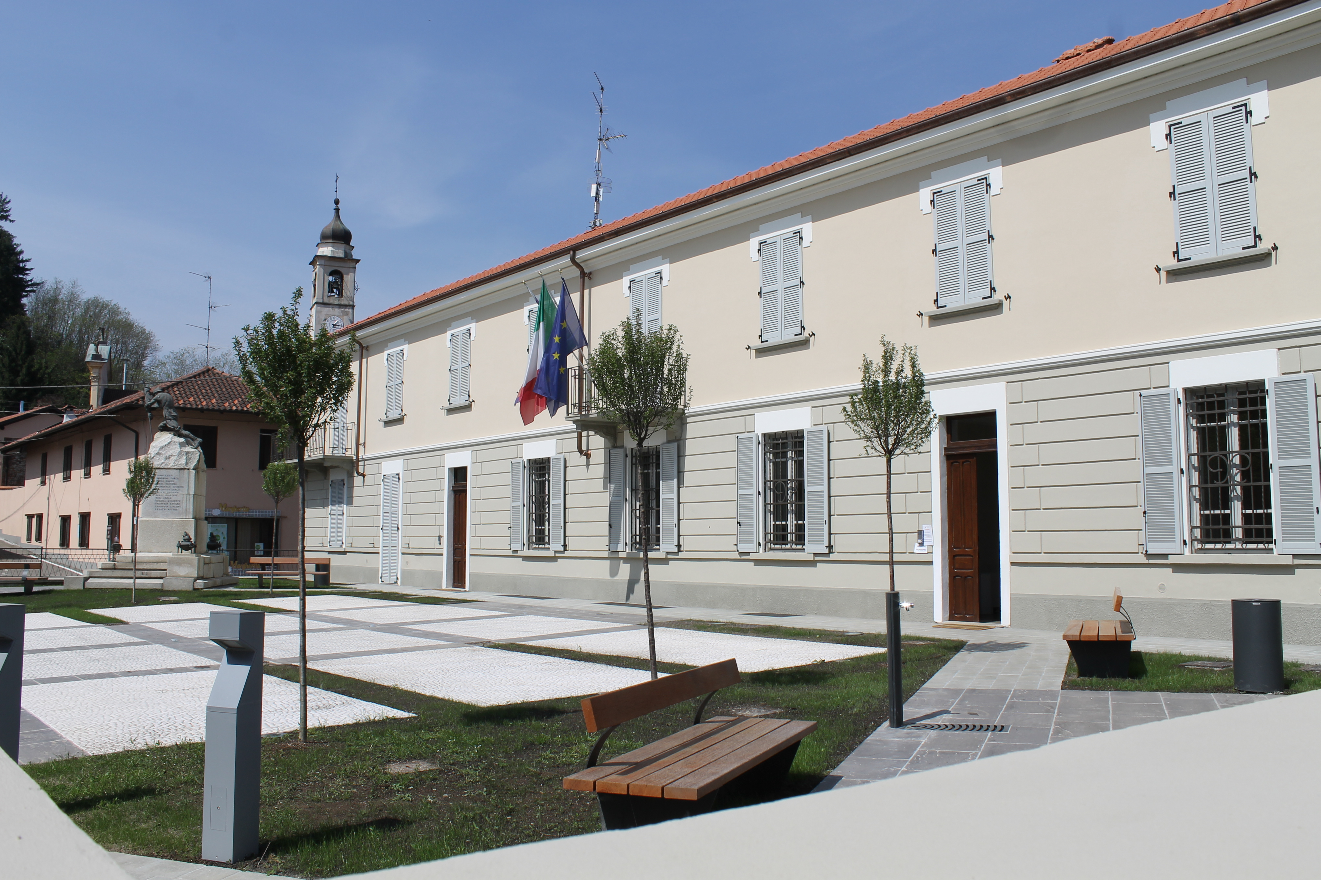 Scatto della nuova piazza dinnanzi al Comune di Barengo come appare a seguito dei lavori di ristrutturazione eseguiti nel 2013